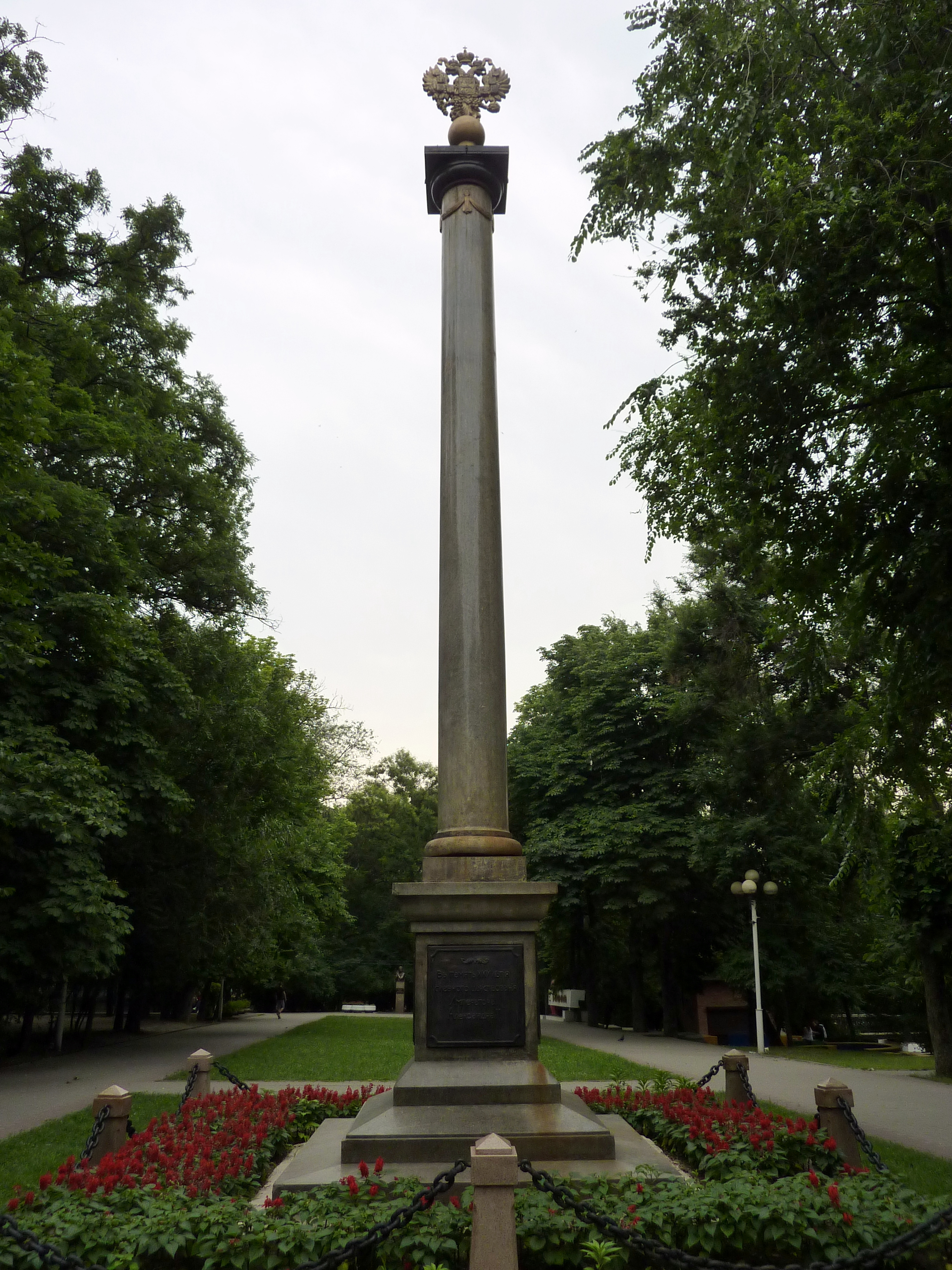 Alexander Column (a view of the entrance to the park)